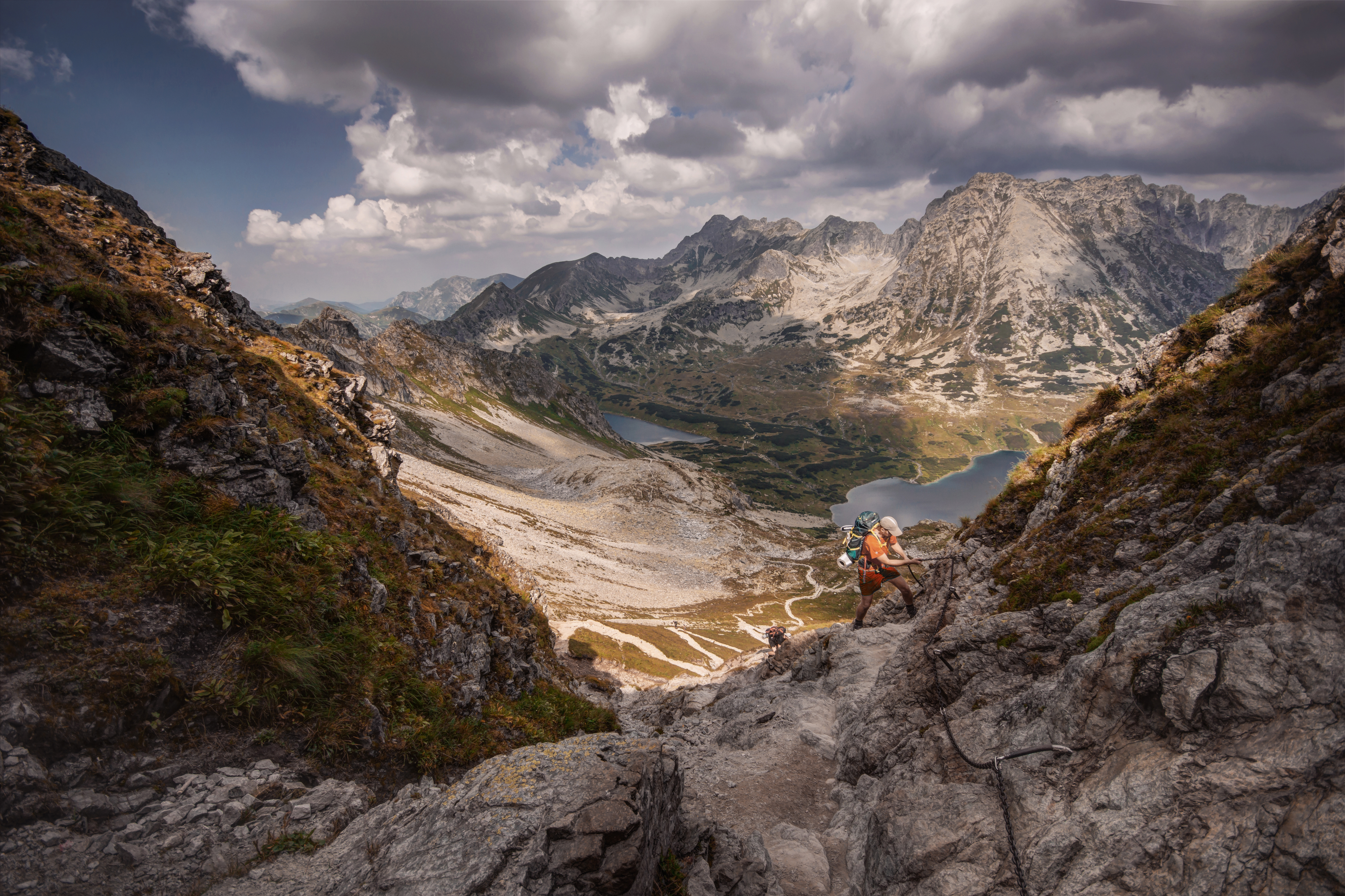 Specjalny obszar ochrony siedlisk: Tatry Łańcuchy na szlaku wiodącym na Szpiglasową Przełęcz, w tle Dolina Pięciu Stawów i Kozi Wierch This is a photography of protected area with CRFOP ID PL.ZIPOP.1393.N2K.PLC120001.H